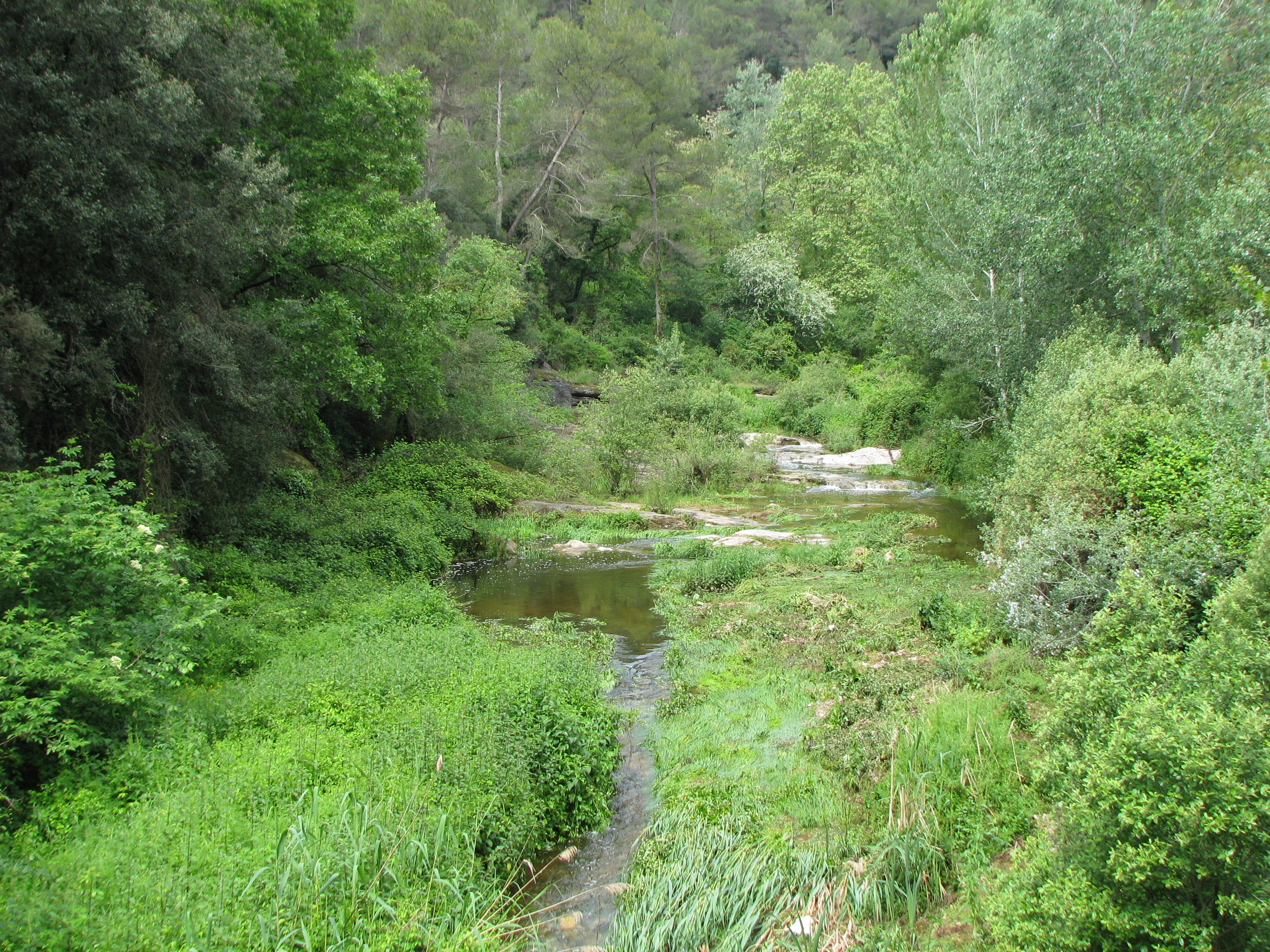 Río Ripoll a la altura de Les Arenes, término municipal de Castellar del Vallés.